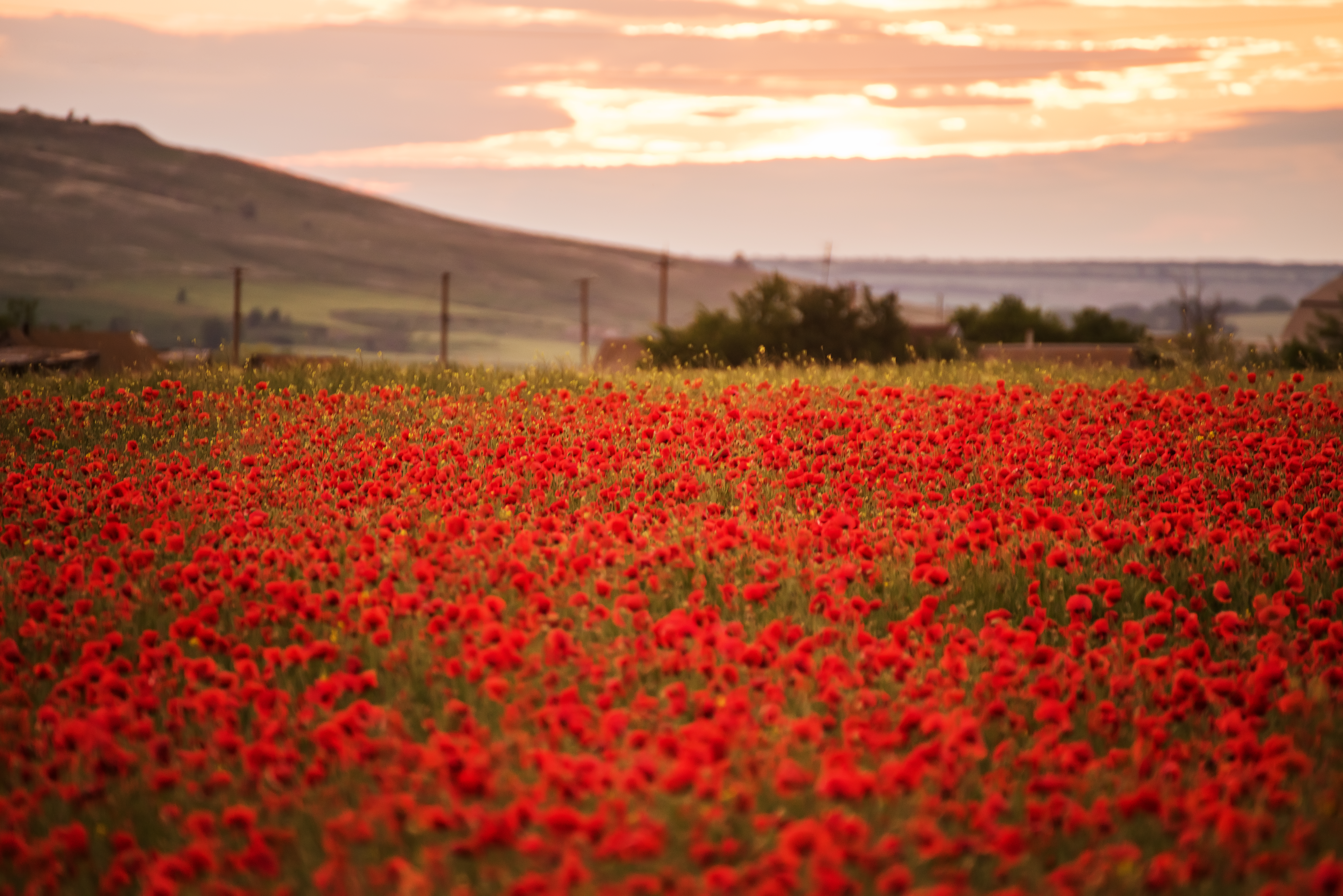 «Костянська балка», Роздільнянський р-н, Кіровська і Єгорівська сільські ради